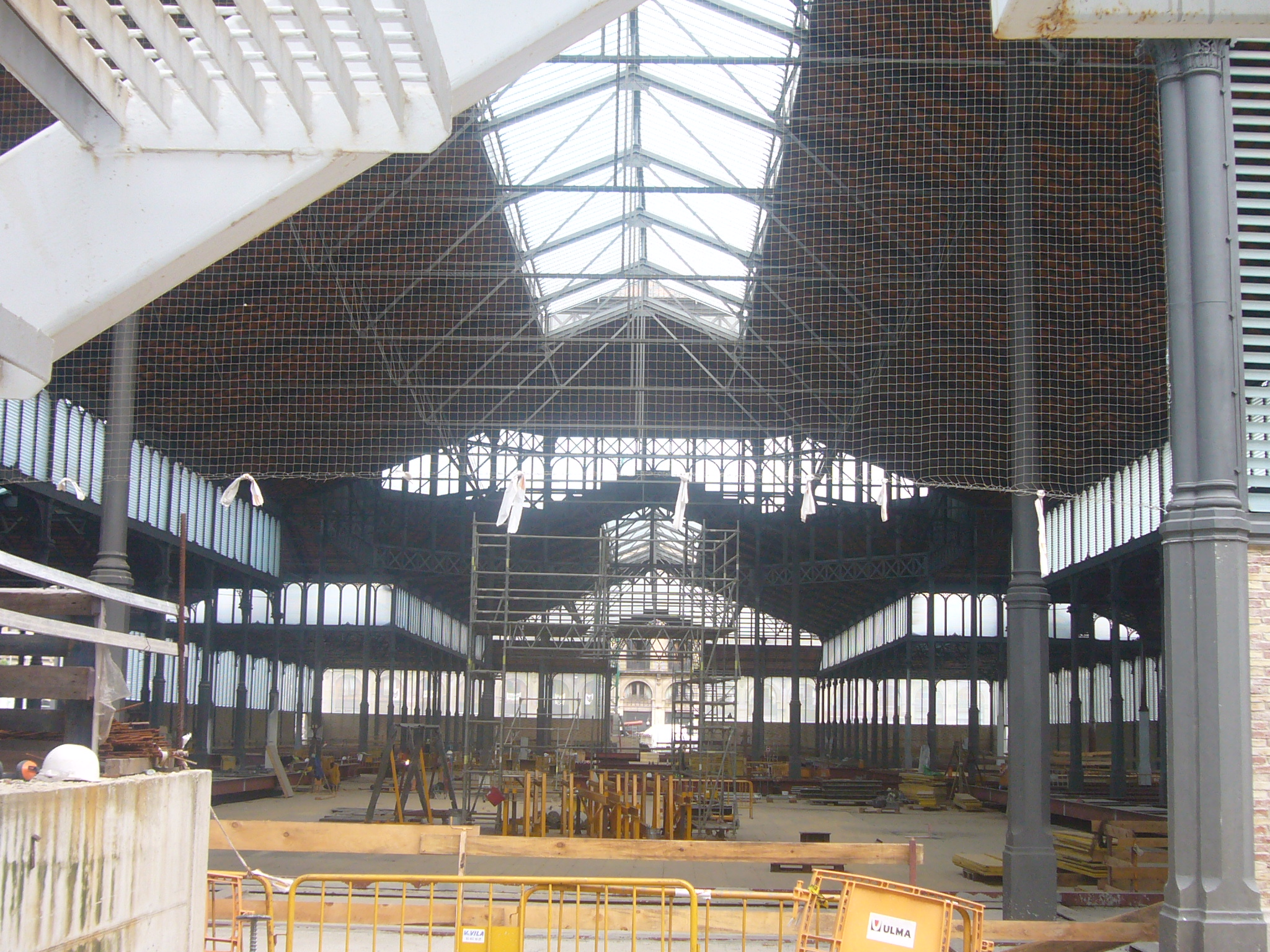 Interior del Mercat del Born vist des del carrer de la Ribera, durant les obres. Any 2011